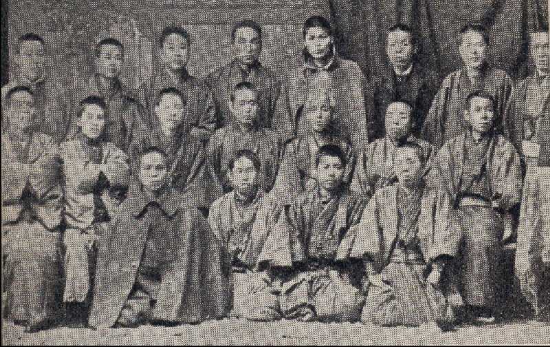 保安条例（1887年12月25日制定・発布・施行）に違犯した入獄者--前列左から2人目が長沢理定、中列左端横山又吉、2人目黒岩一二、4人目片岡健吉、後列左から2人目安芸喜代香